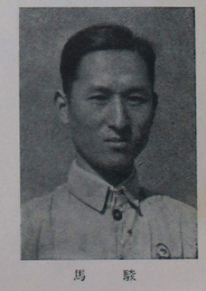 中國人民政治協商會議第一屆全體會議代表